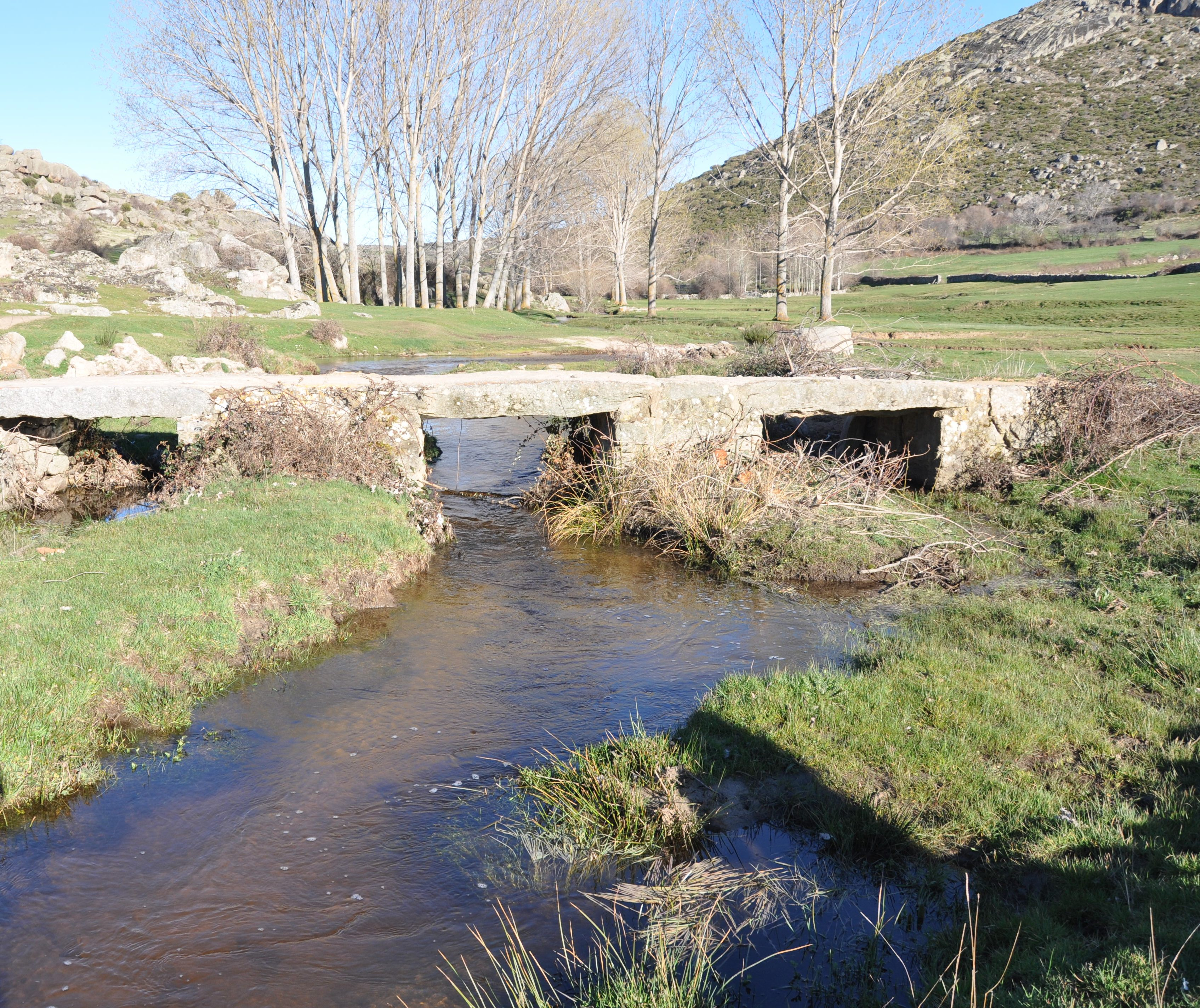 Puente en Riofrío, sobre el arroyo del Guijo, provincia de Ávila, España